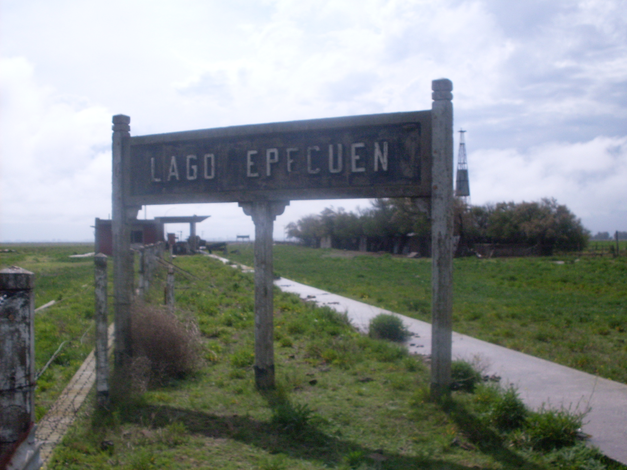 Estación Lago Epecuén, Prov. de Bs As.